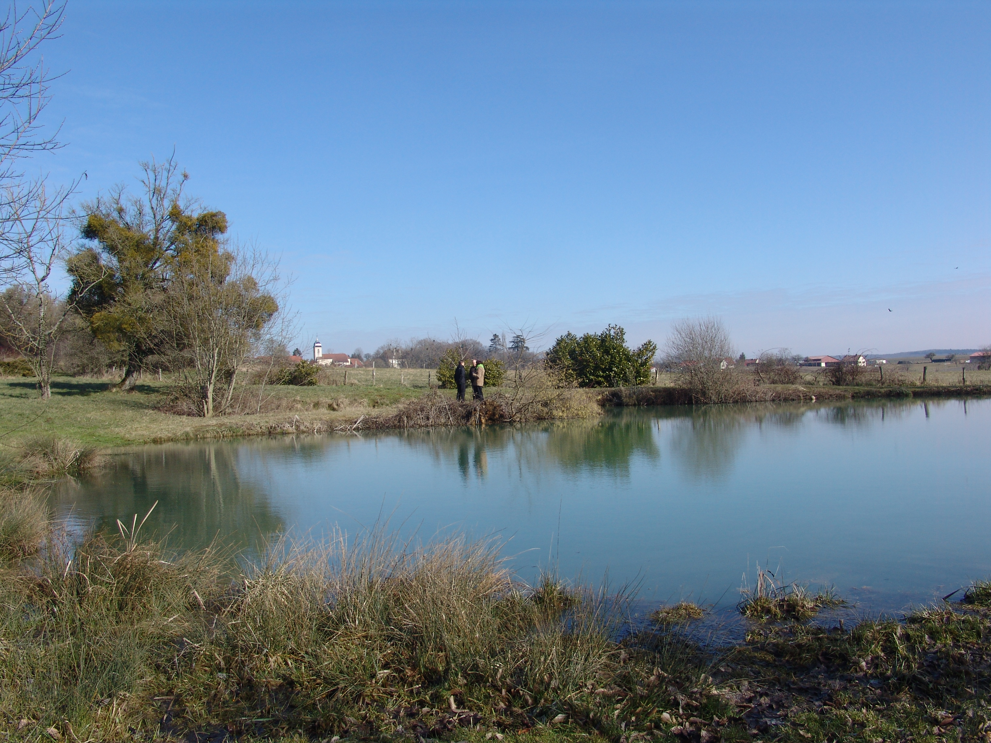 vijver